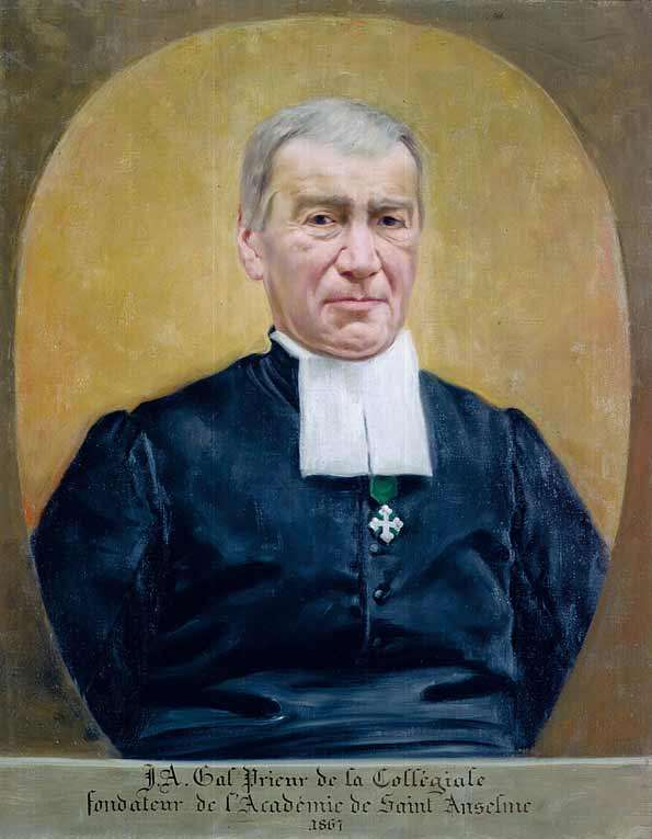 Giuseppe Lancia, Ritratto del Priore Jean-Antoine Gal, olio su tela del 1867, 89x72 cm, di proprietà dell'Académie Saint-Anselme (Aosta).